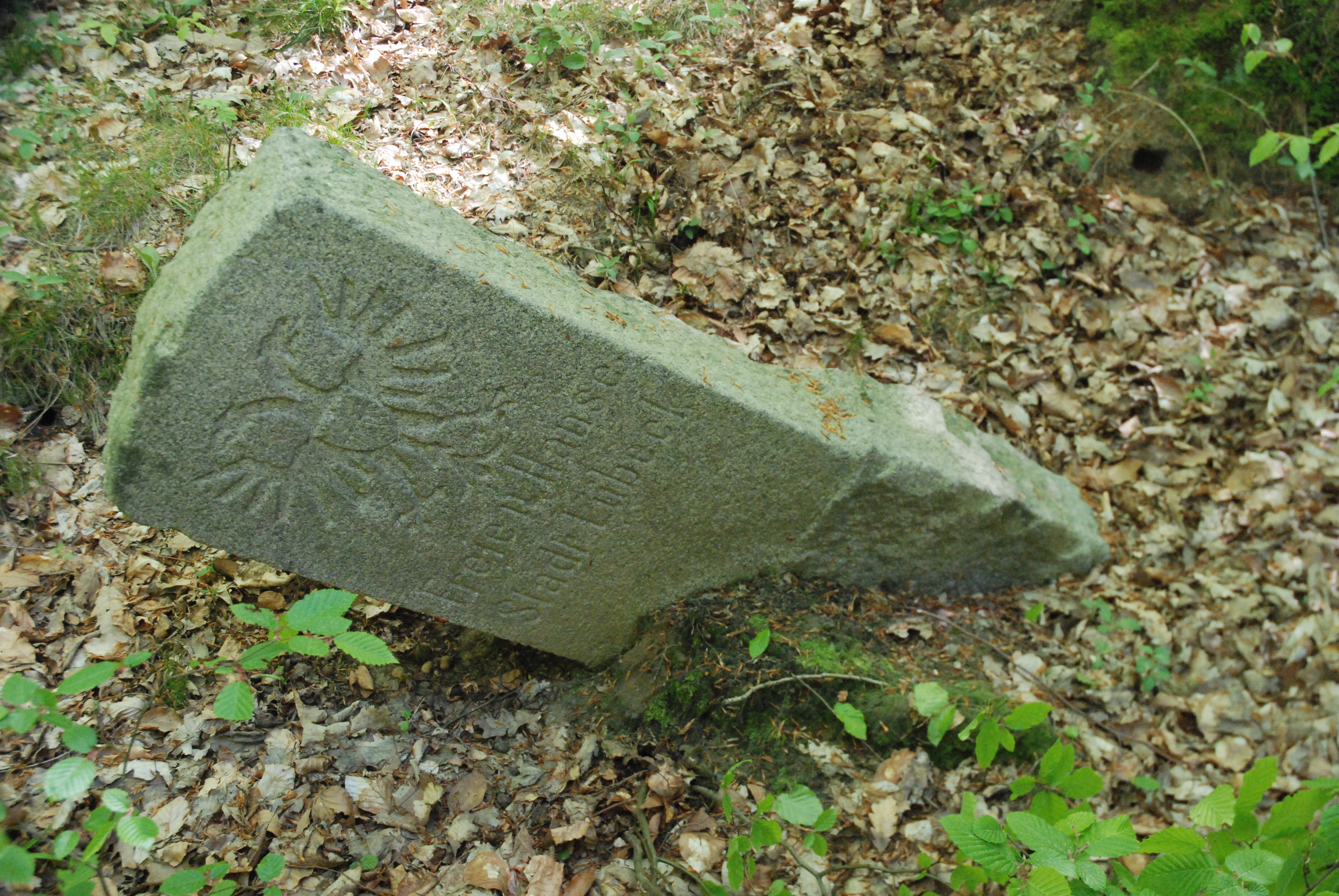 Historischer Grenzstein mit dem Lübecker Doppeladler, Scheidestein im Grenzverlauf nach 1865, Standorf: südlich der Straße von Lankau nach Albsfelde, sehr geneigt, steht aber stabil